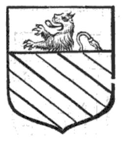 Armes des Servien, D'azur, à trois bandes d'or, au chef cousu d'azru, chargé d'un lion issant d'or.